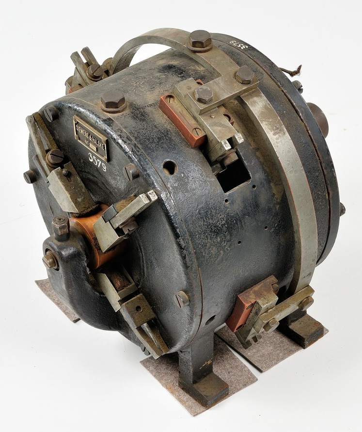 Gleichstrom-Unipolar-Maschine, Siemens & Halske Inventarnummer: 3579 Hersteller: Siemens & Halske Objektmaß (H x B x L/T): 380 x 365 x 410 mm Masse: 116 kg